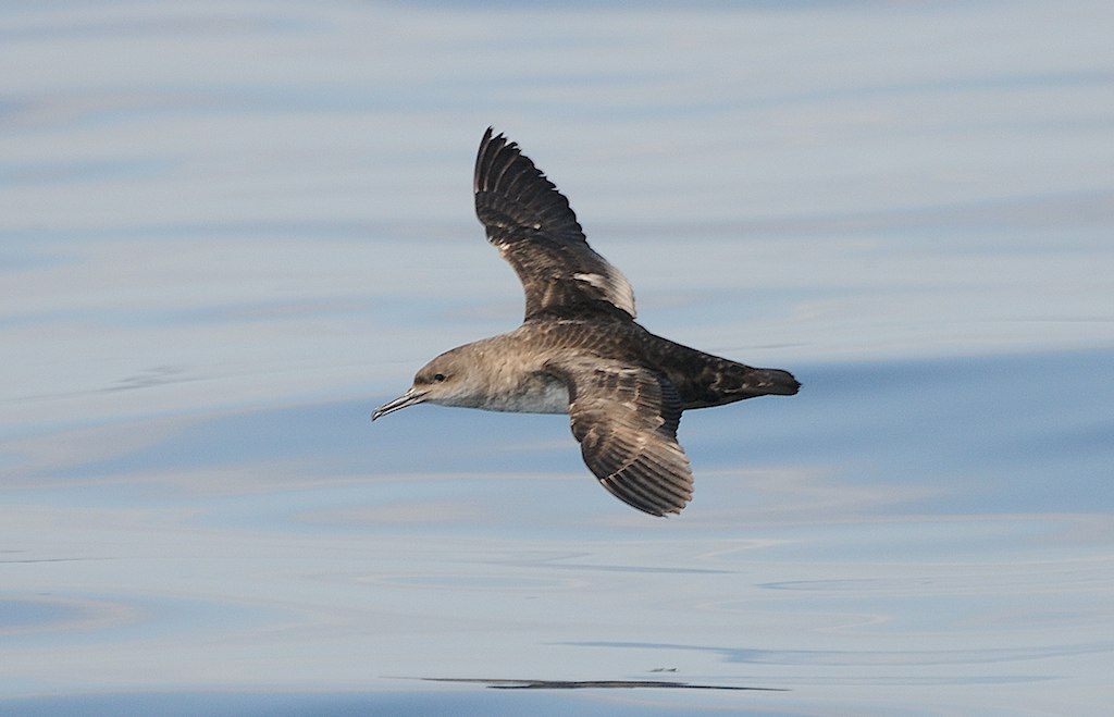 Skua_20100427_161918